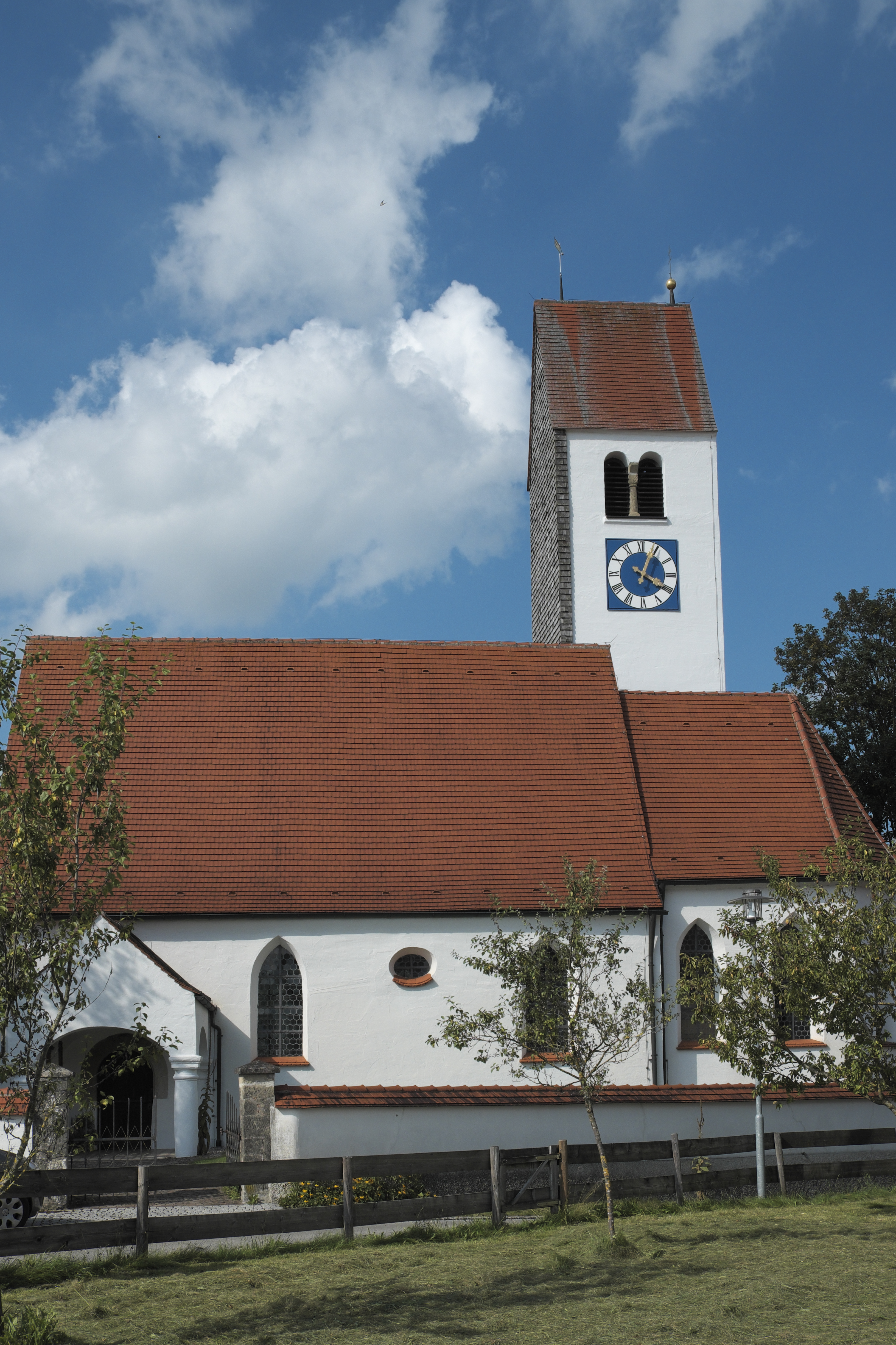 Katholische Filialkirche St. Maria Magdalena in Urspring, einem Ortsteil von Steingaden im Landkreis Weilheim-Schongau (Bayern/Deutschland), Tür an der nördlichen Langhauswand